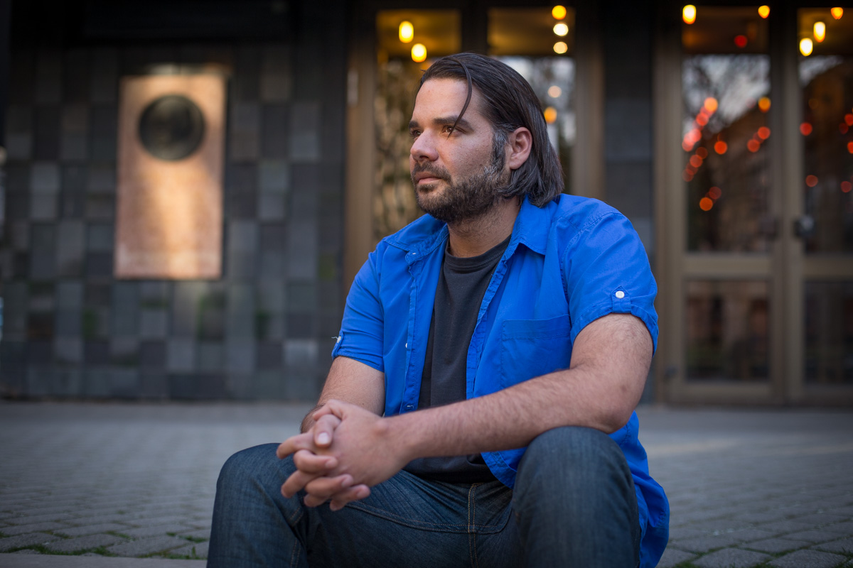 Gémes Antos,Hevesi Sándor tér, 2015. május (eredeti képnév: IMG_5632.jpg, on-line